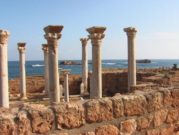 Apollonia (Libia) - Central church